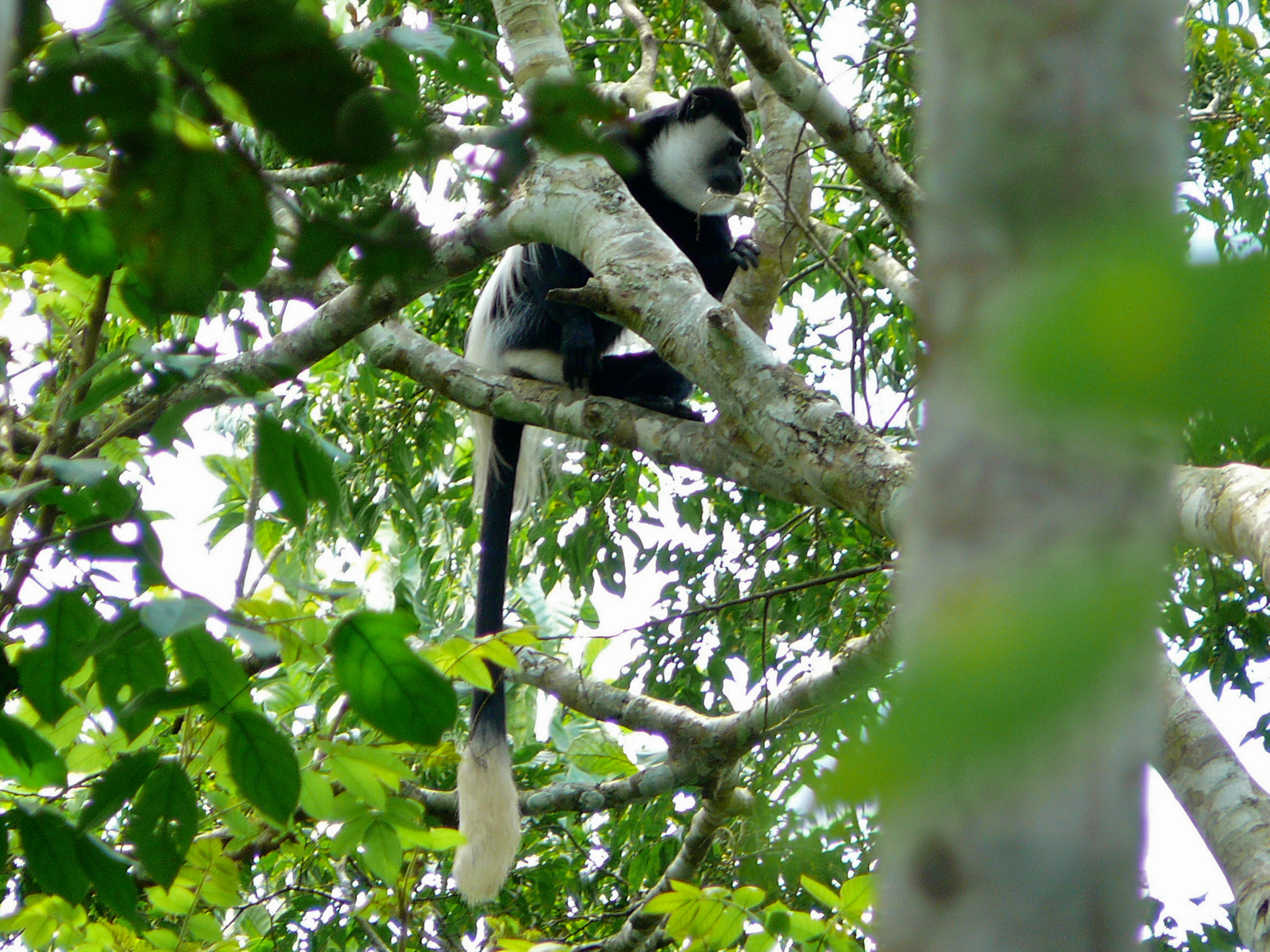 Kibale Forest NP, UGANDA